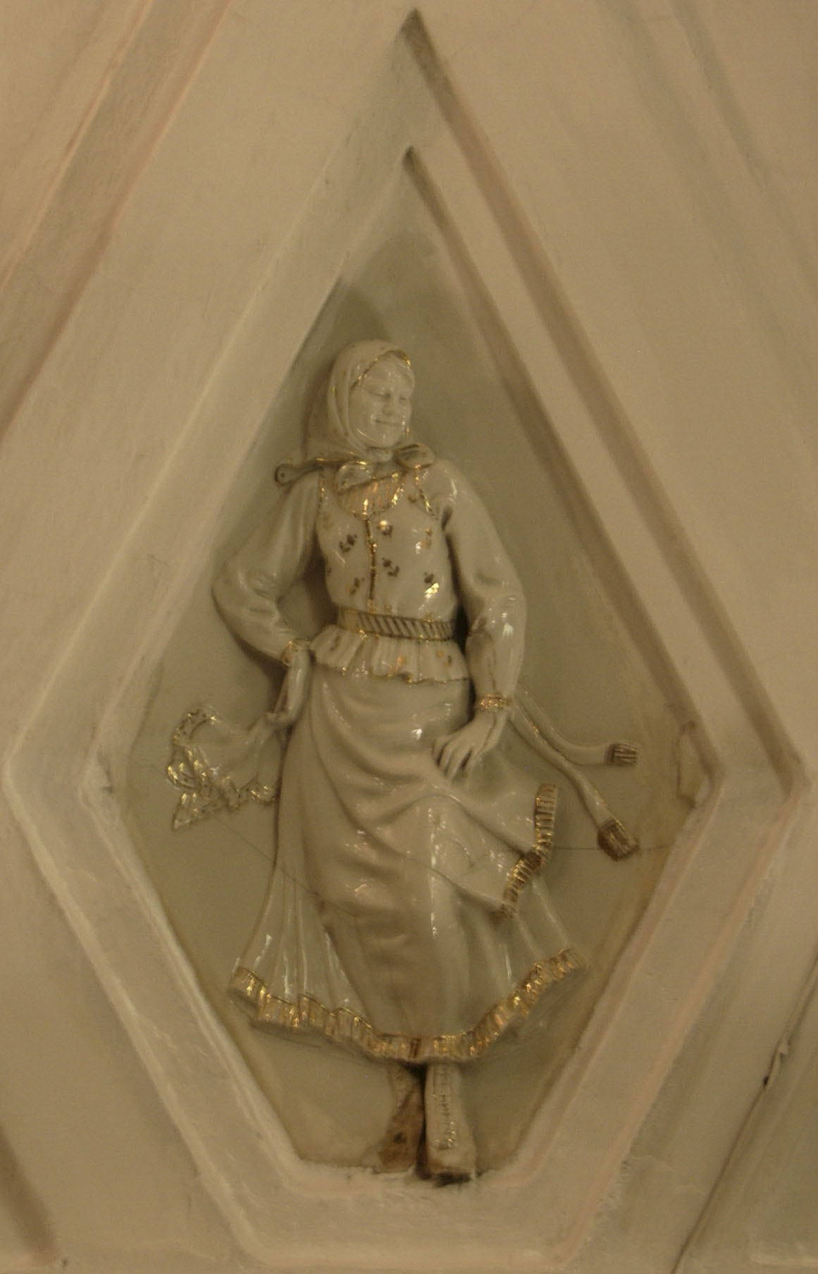 Фарфоровая фигурка на станции "Театральная" Московского метрополитена. Изготовлена на Ленинградском фарфоровом заводе, по эскизам скульптора Н. Я. Данько.